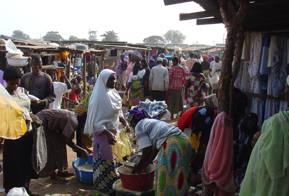 Kuje Market, Kuje, Nigeria